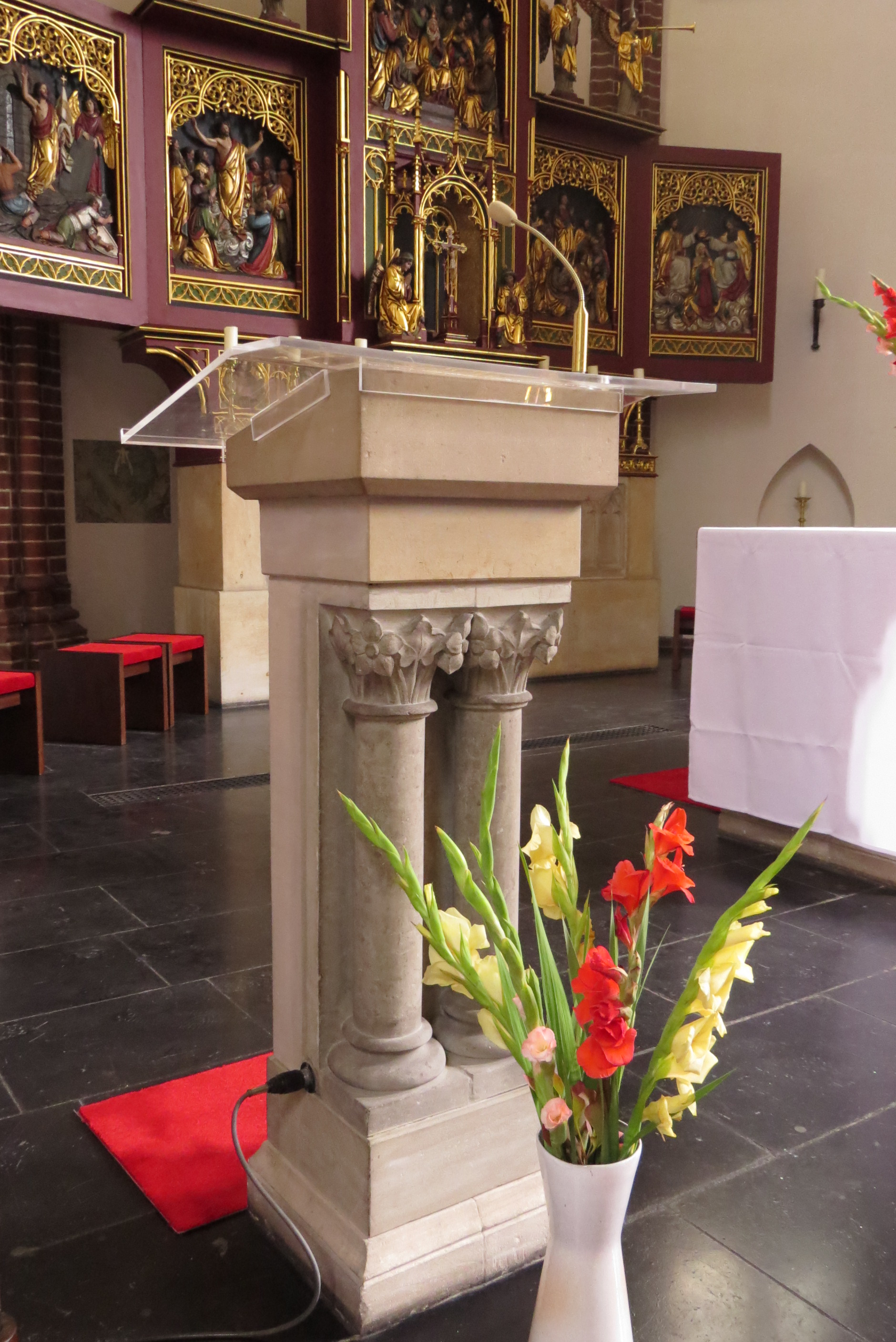 Kirche St. Georg, Berlin-Pankow, Ambo